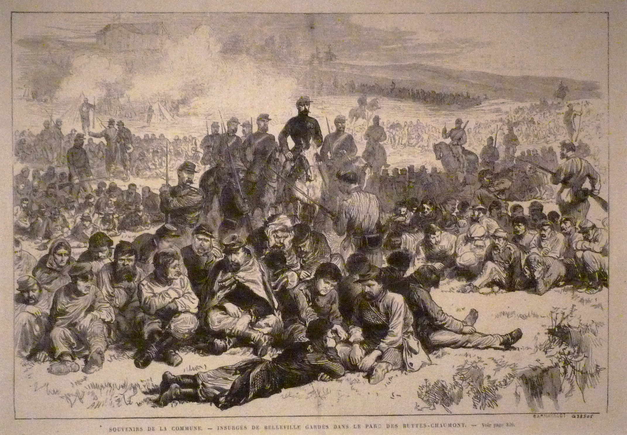 Exposition La Commune de Paris à l'Hôtel de Ville de Paris (18 mars - 28 mai 2011) - Insurgés de Belleville gardés par l'armée versaillaise dans le parc des Buttes-Chaumont.